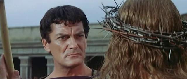 Scena del film Ponzio Pilato (1962)